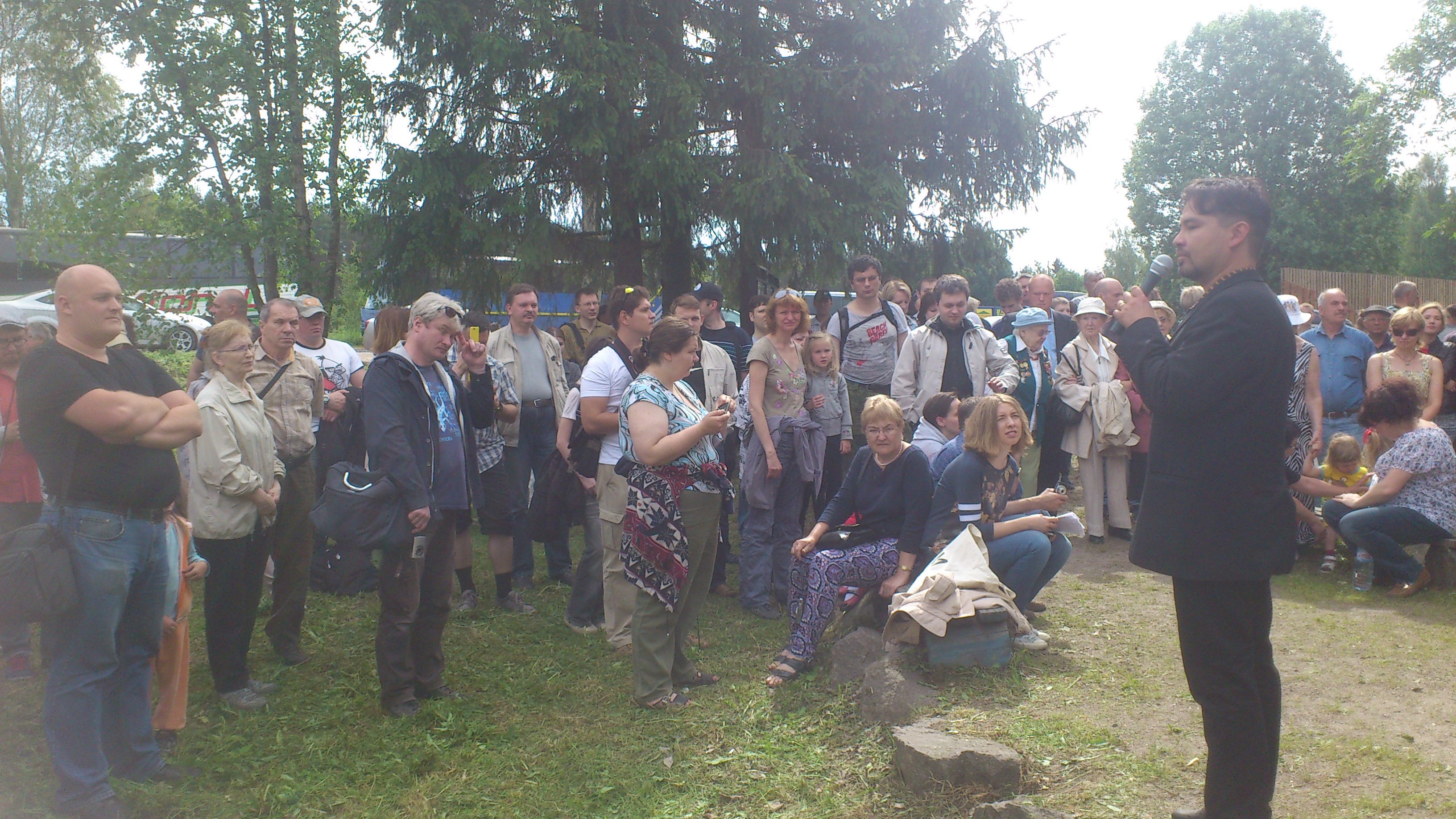 Выступление Баира Иринчеева у монумента финским солдатам, оборонявшим 12-15 июня 1944 года линию ВТ. Посёлок Лебяжье, Выборгский район Ленинградской области.